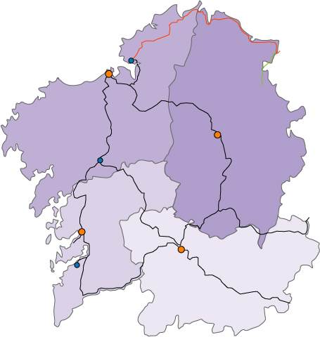 Mapa de las lineas de ferrocarril en Galicia (España) a Junio de 2006. La línea Ferrol-Ribadeo (en rojo) es ferrocarril de vía estrecha (FEVE). La línea en verde es el antiguo ferrocarril minero desmantelado Vilaodriz-Ribadeo.